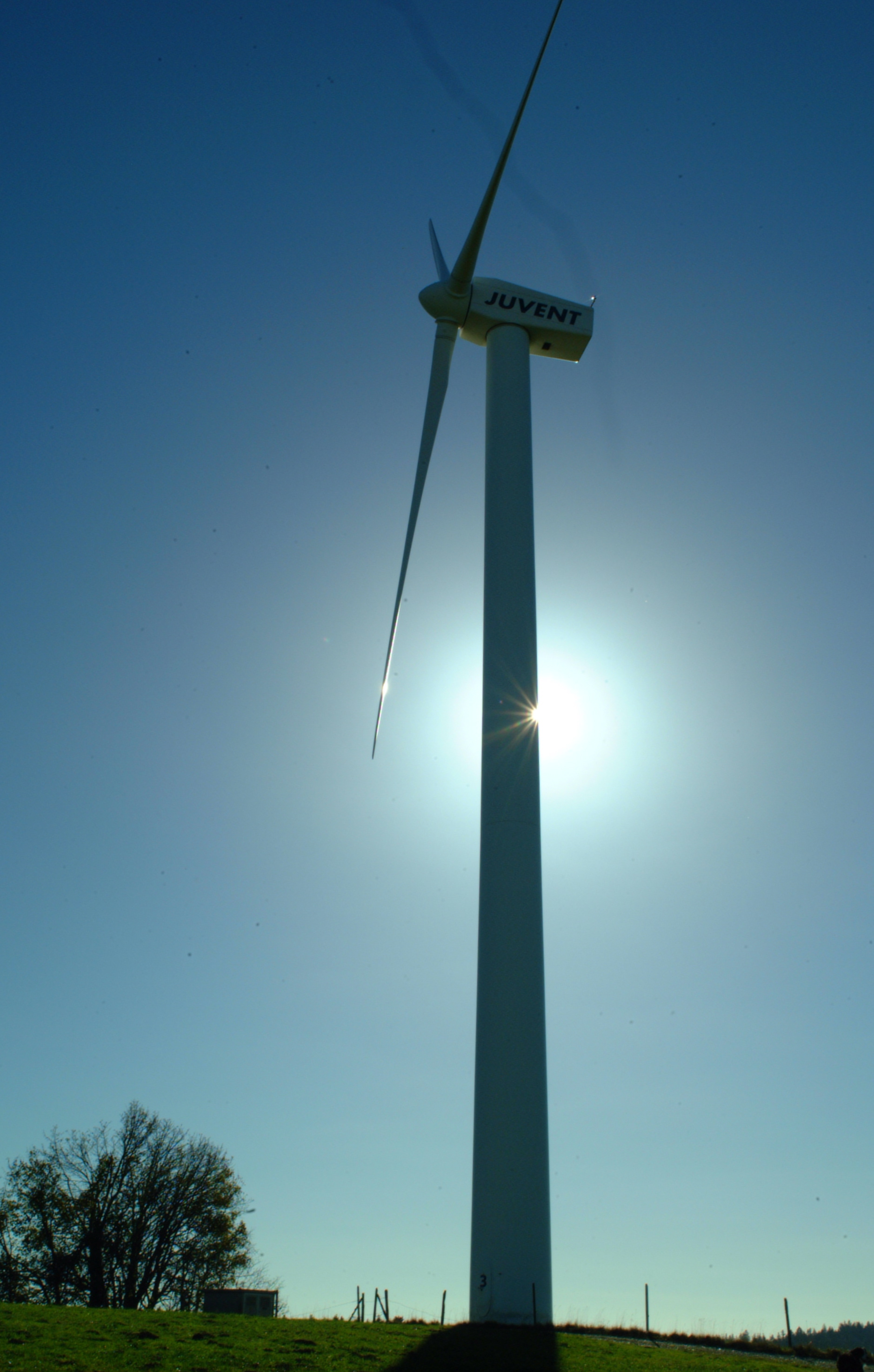 Eolienne, Mont Soleil, Jura bernois (Suisse)